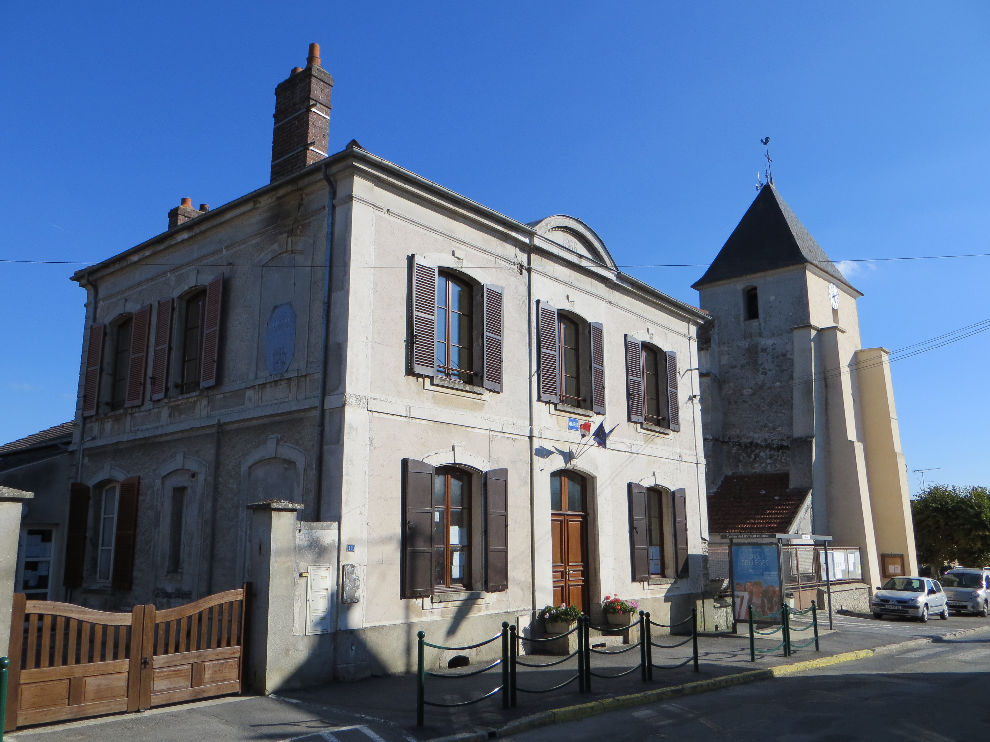 Mairie et église Saint-Germain